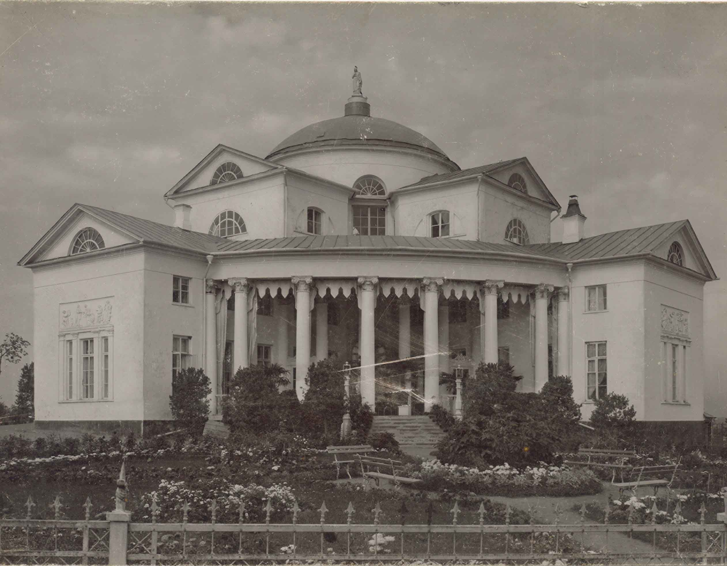 Голофтеевская дача в Люблине